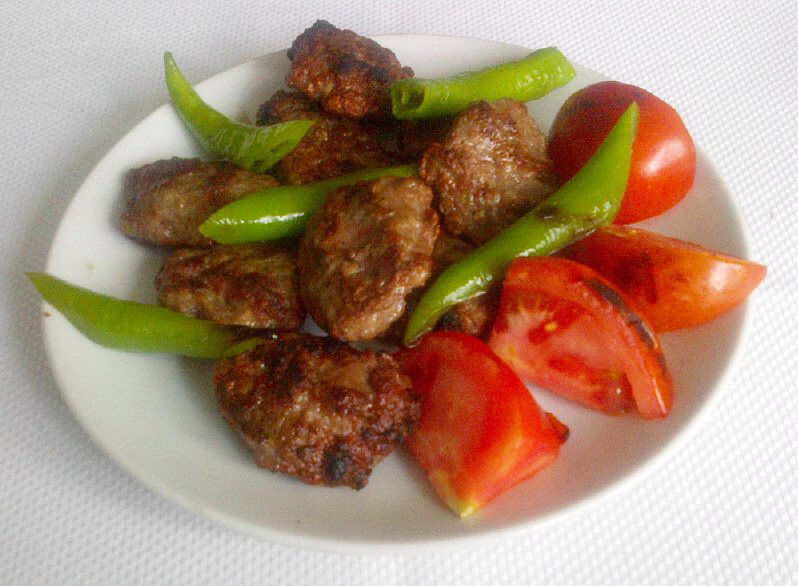 Inegöl köfte o mandonguilles d'Inegöl, de la cuina de Bursa, Turquia.